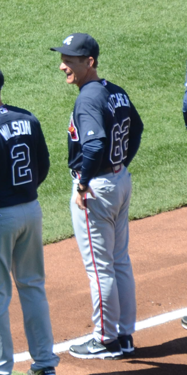 Scott Fletcher